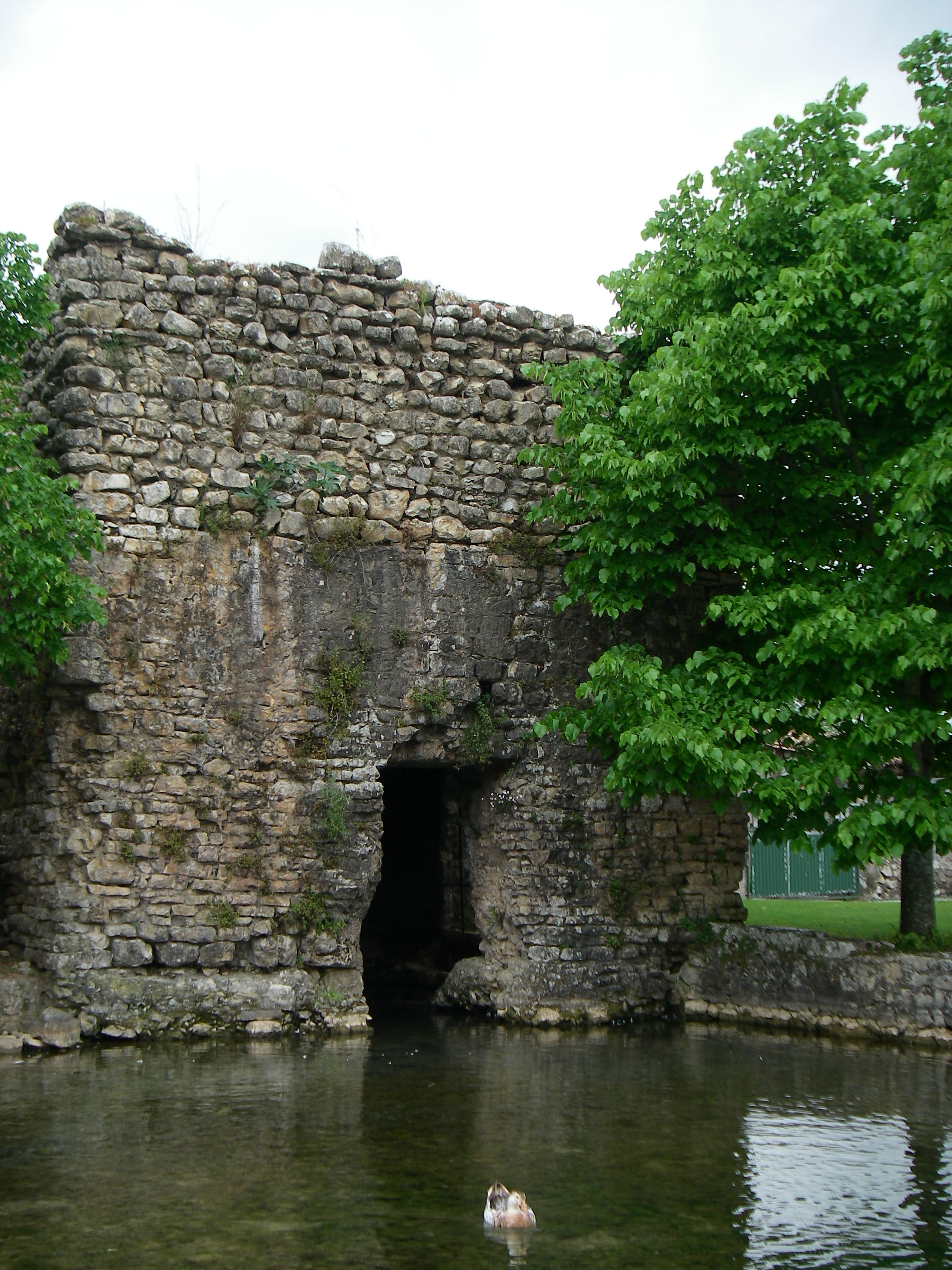 Aqueduto romano de Conímbriga e Castellum de Alcabideque This file was uploaded for Wiki Loves Monuments in Portugal with the unique identifier 70388.